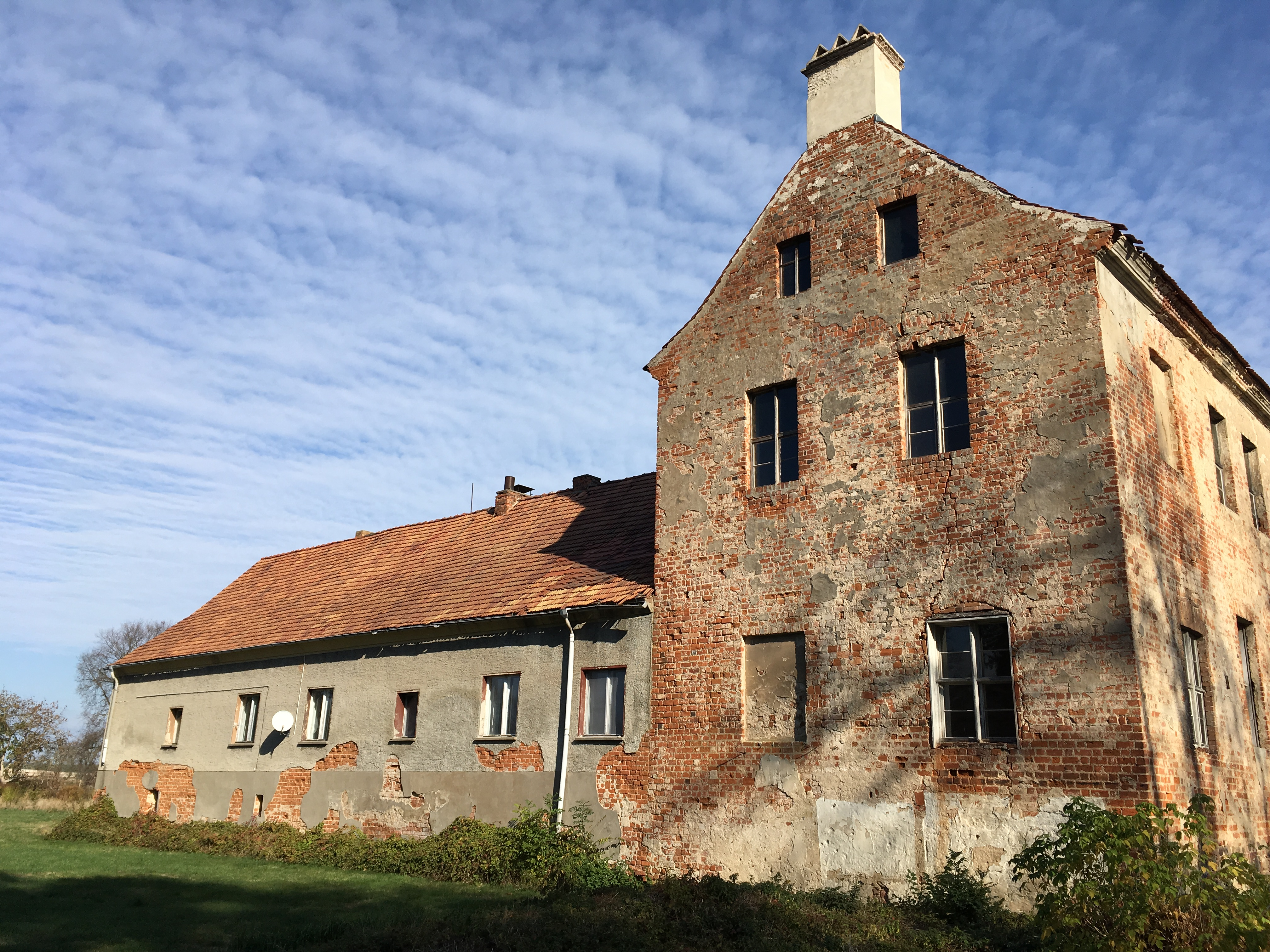 Das Schloss Münchehofe – offizielle Bezeichnung Herrenhaus mit Park – entstand in der Zeit um 1640 und weist als Besonderheit eine Kapelle im rechten Giebel des Gebäudes auf.